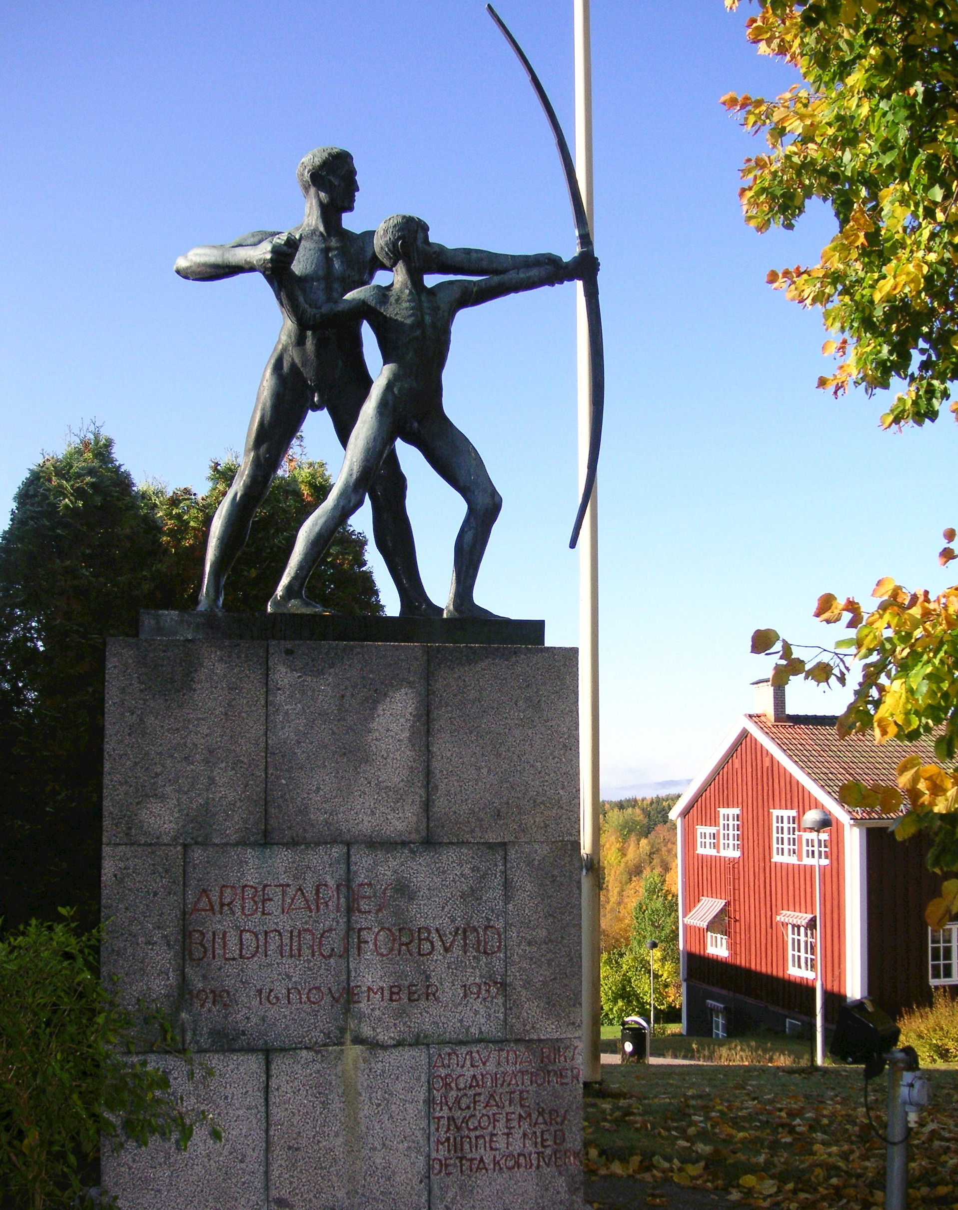 Brunnsvikens folkhögskola